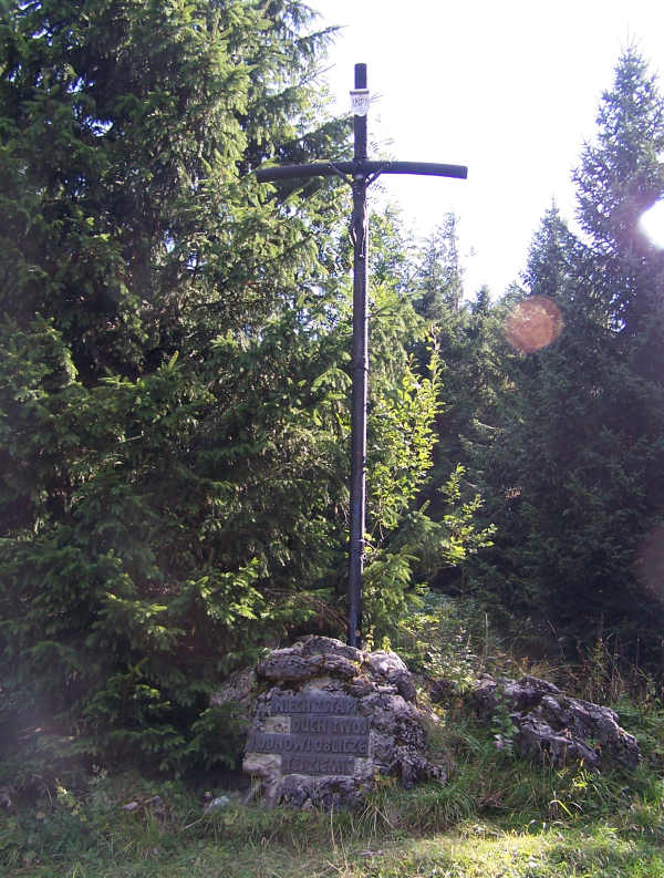 Krzyż papieski na Miętusiej Polanie